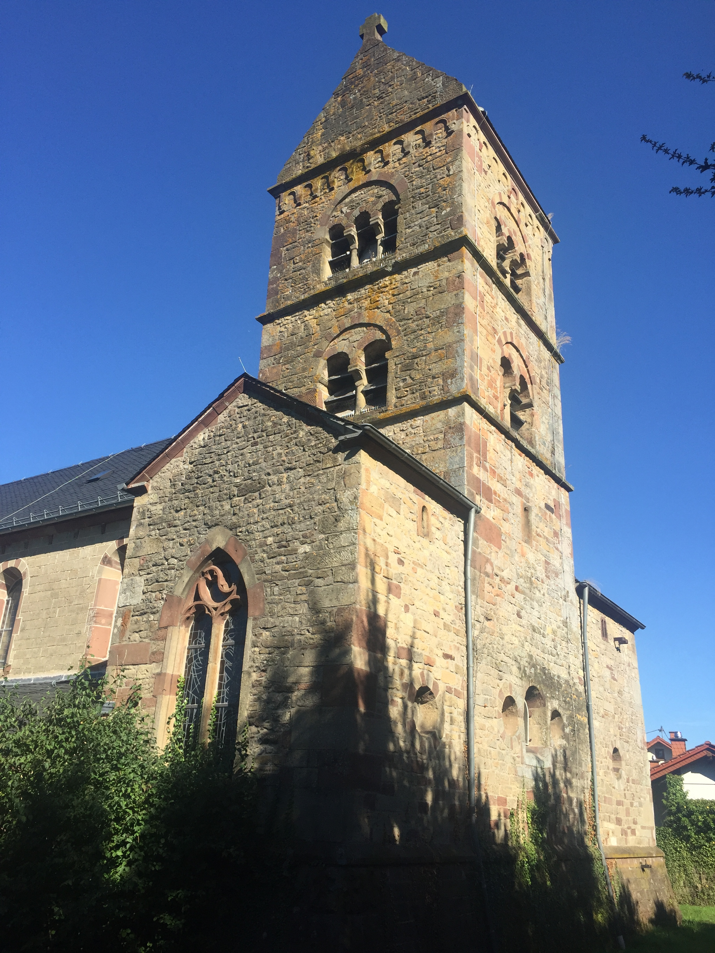 Iglesia del apóstol Santiago en Wintersdorf